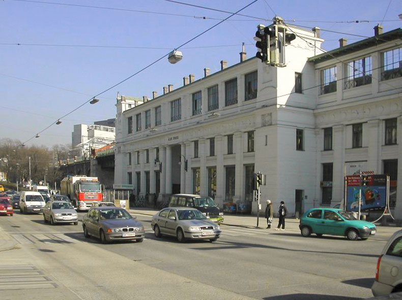 U-Bahn Station Alserstraße (Architekt Otto Wagner) am Wiener Gürtel